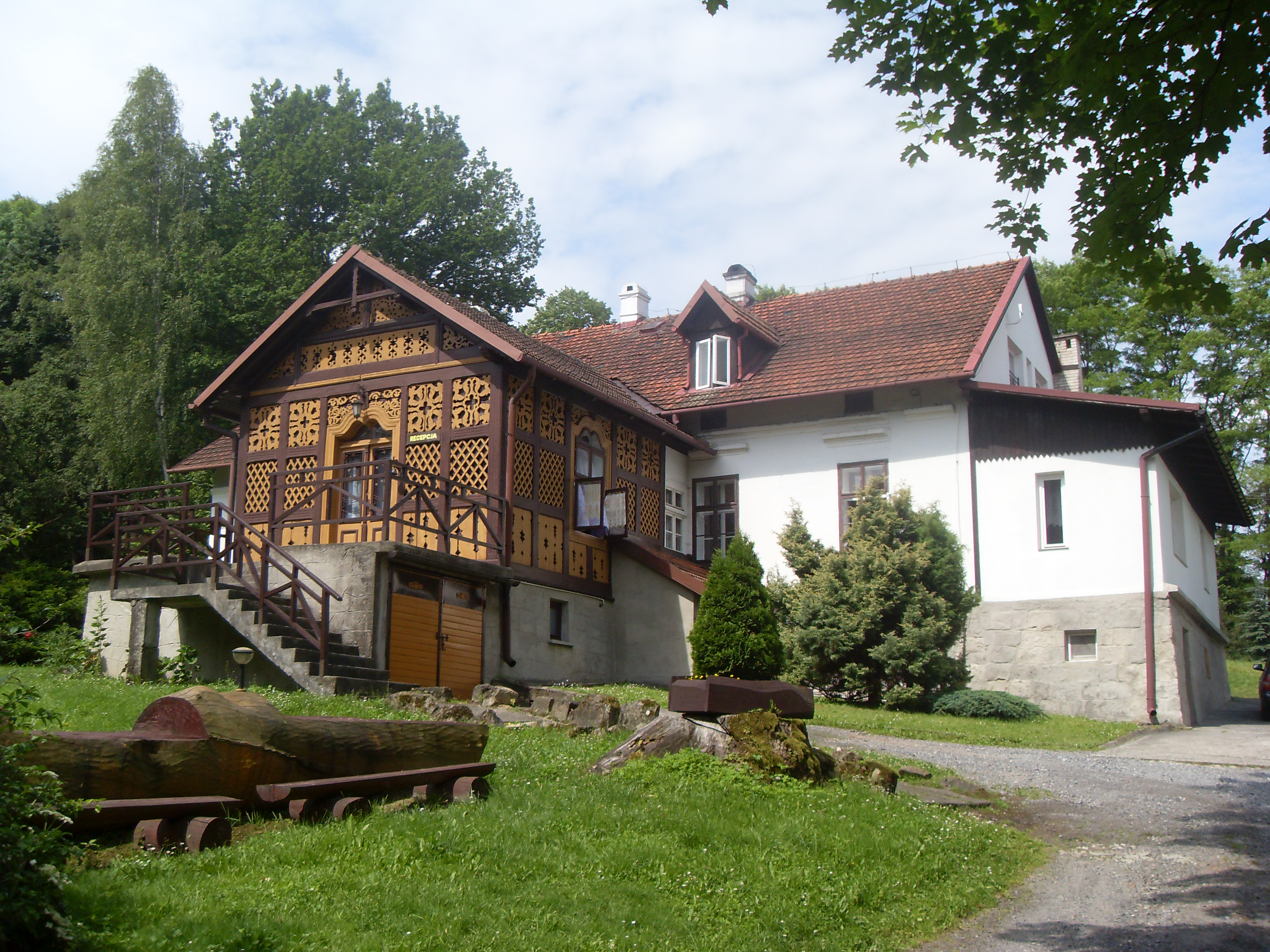 Dwór w Zarzycach Wielkich (pow. wadowicki)